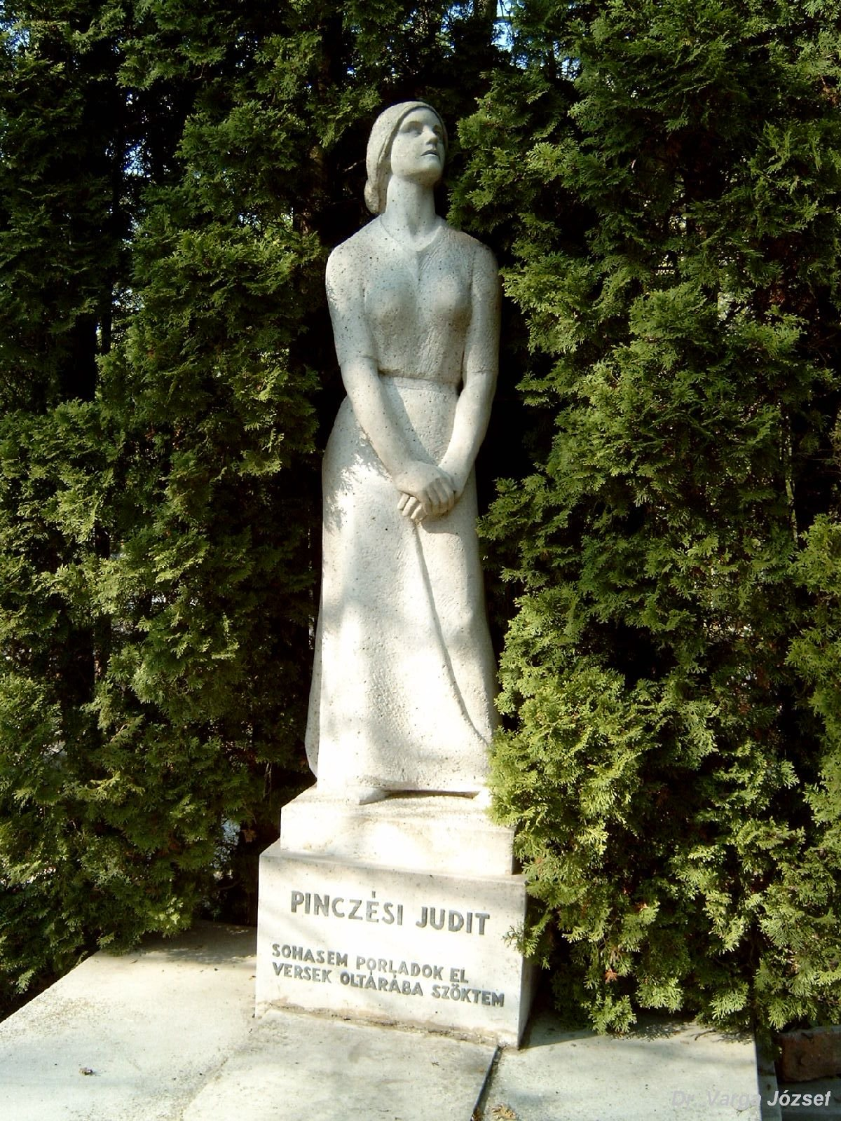 Pinczési Judit (Debrecen, 1947. október 1. – Budapest, 1982. augusztus 12.) költő. Farkasréti temető: 8/3-1-77/78 [szobrász: Pátzay Pál]